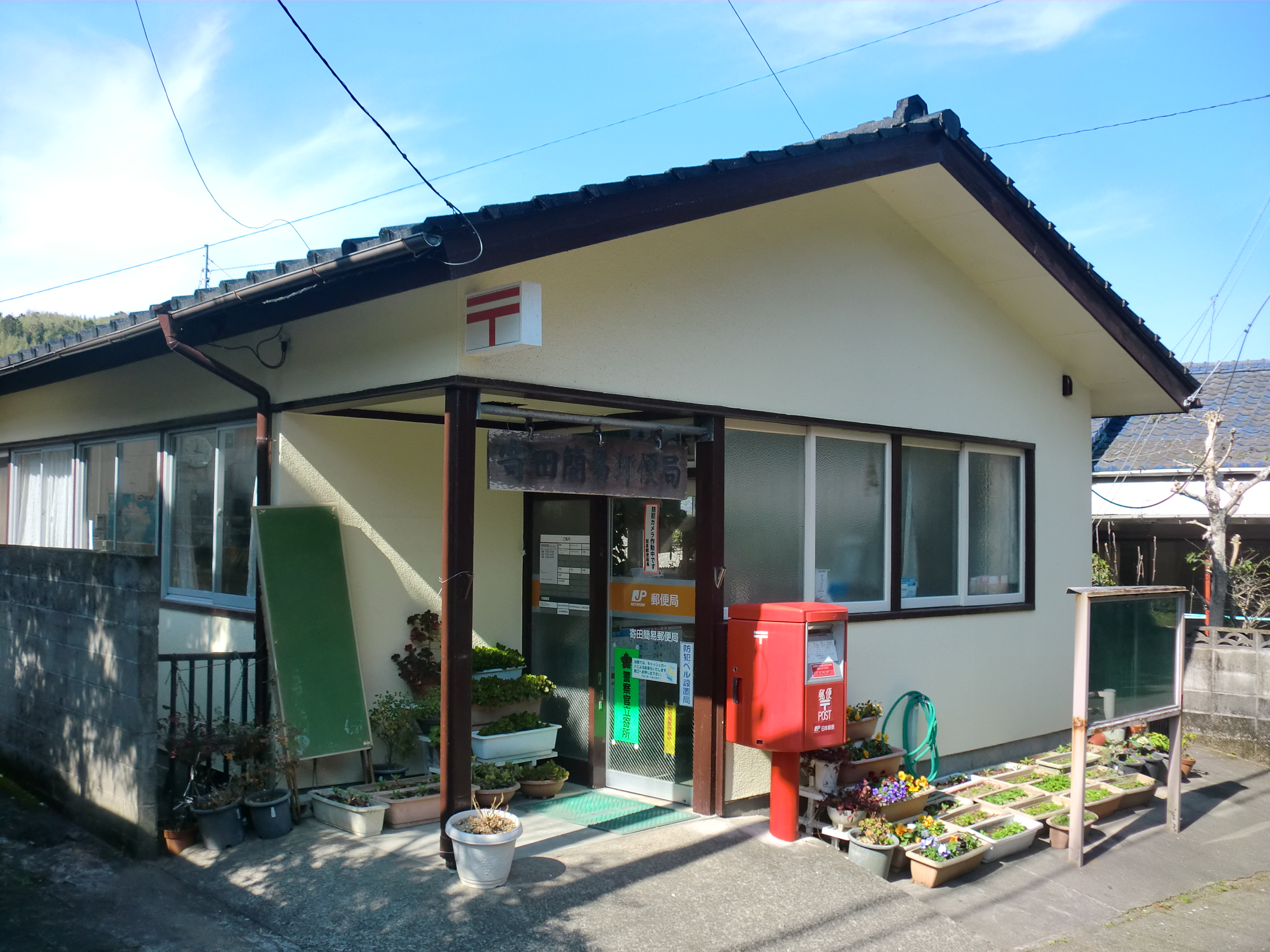 薩摩川内市にある寄田（よりた）簡易郵便局